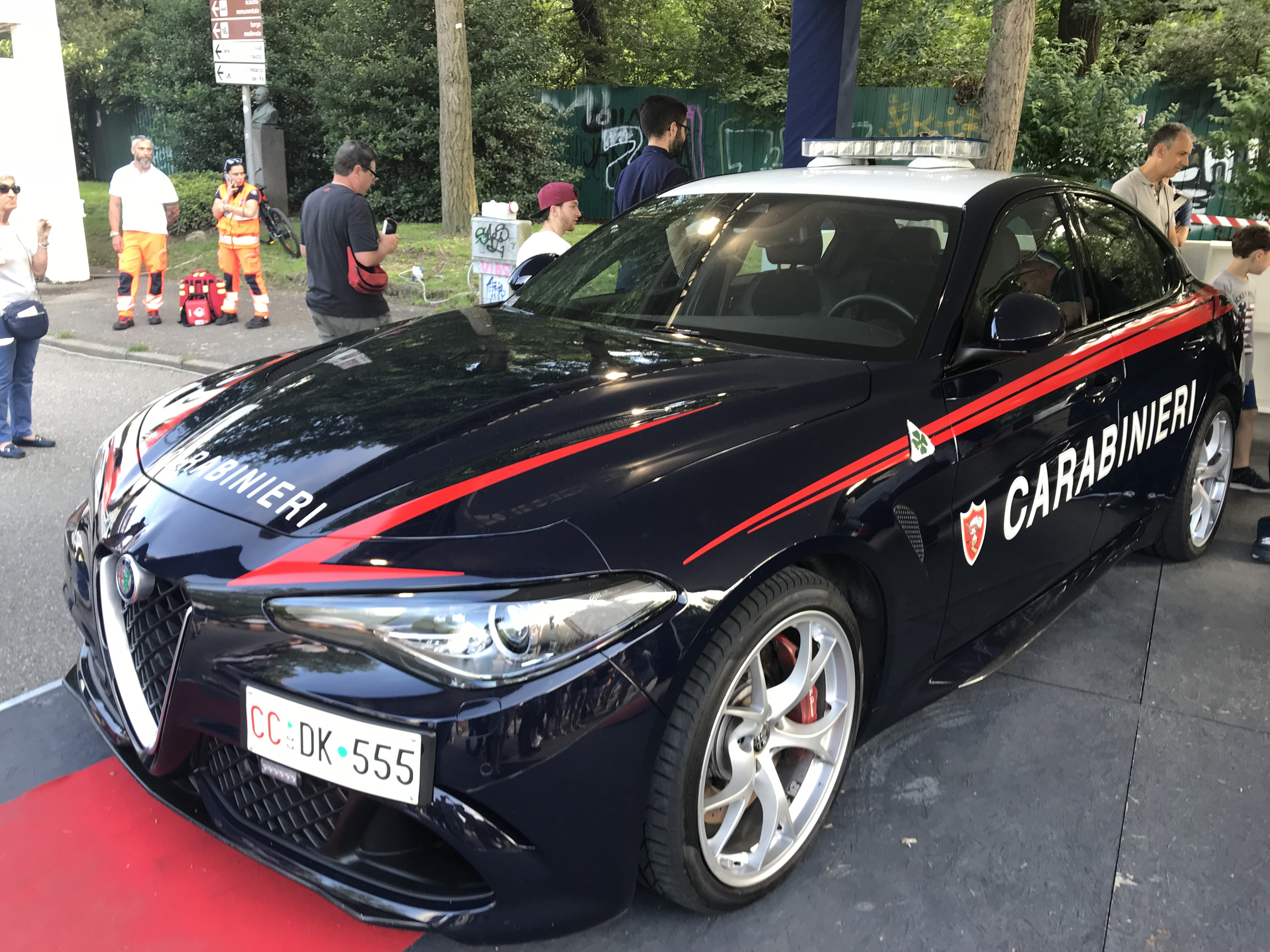 Autovettura esposta al salone dell'auto del Parco del Valentino 2018 a Torino